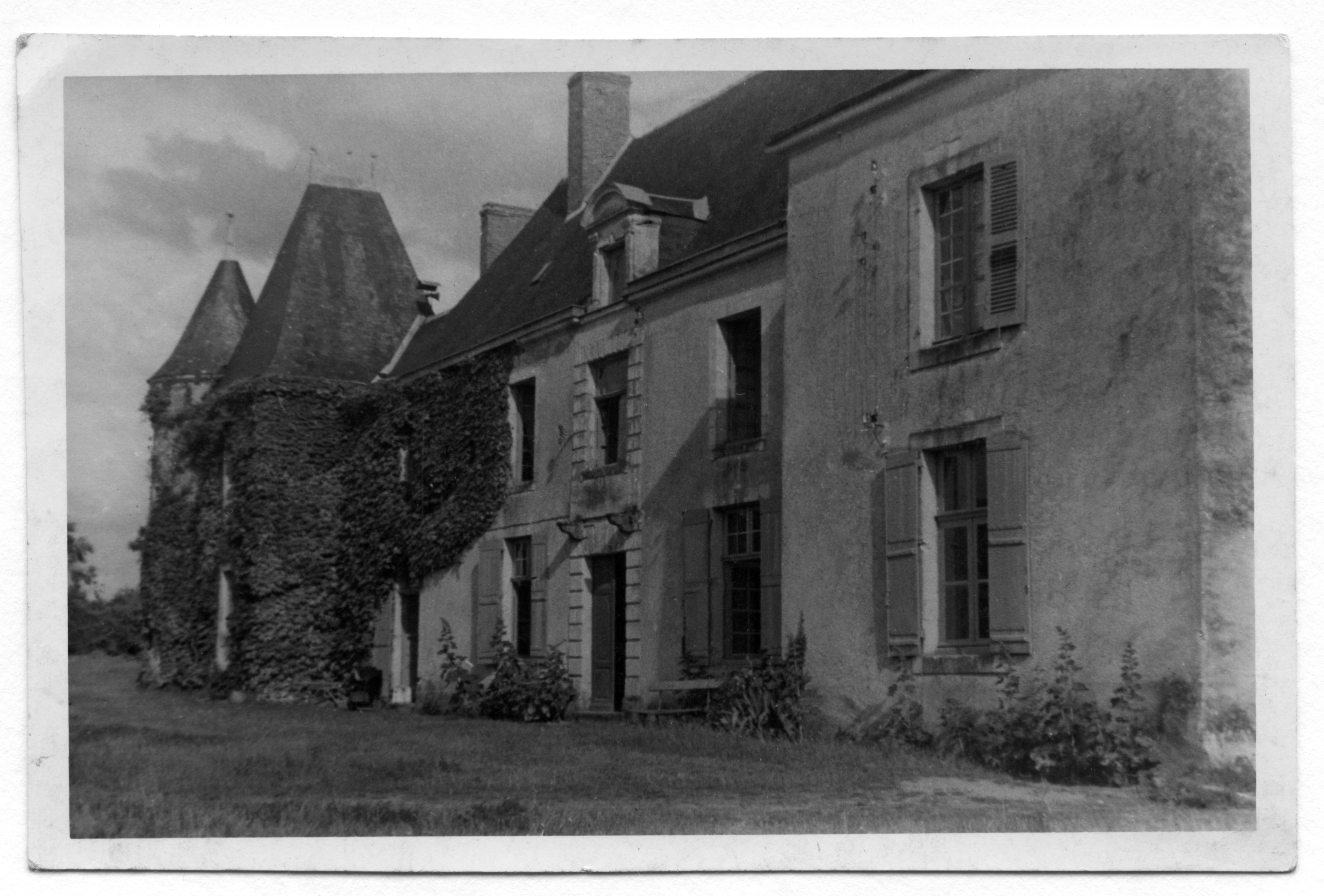 Le château de Princé à la Chapelle-Saint-Laud, en 1944